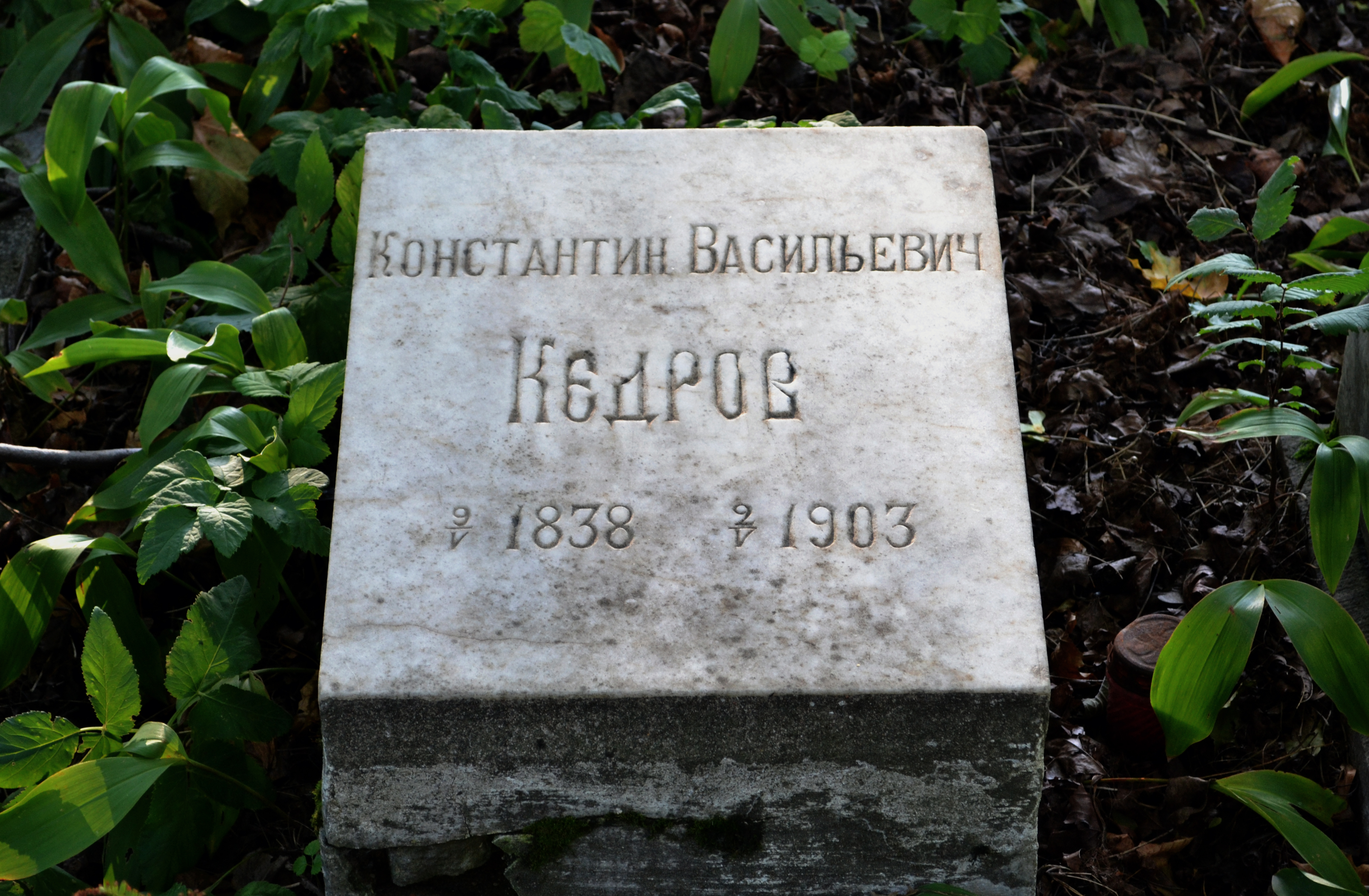 Могила К.В. Кедрова (1828-1903), профессора: Московский проспект, 100, Новодевичье кладбище, Московский район, Санкт-Петербург